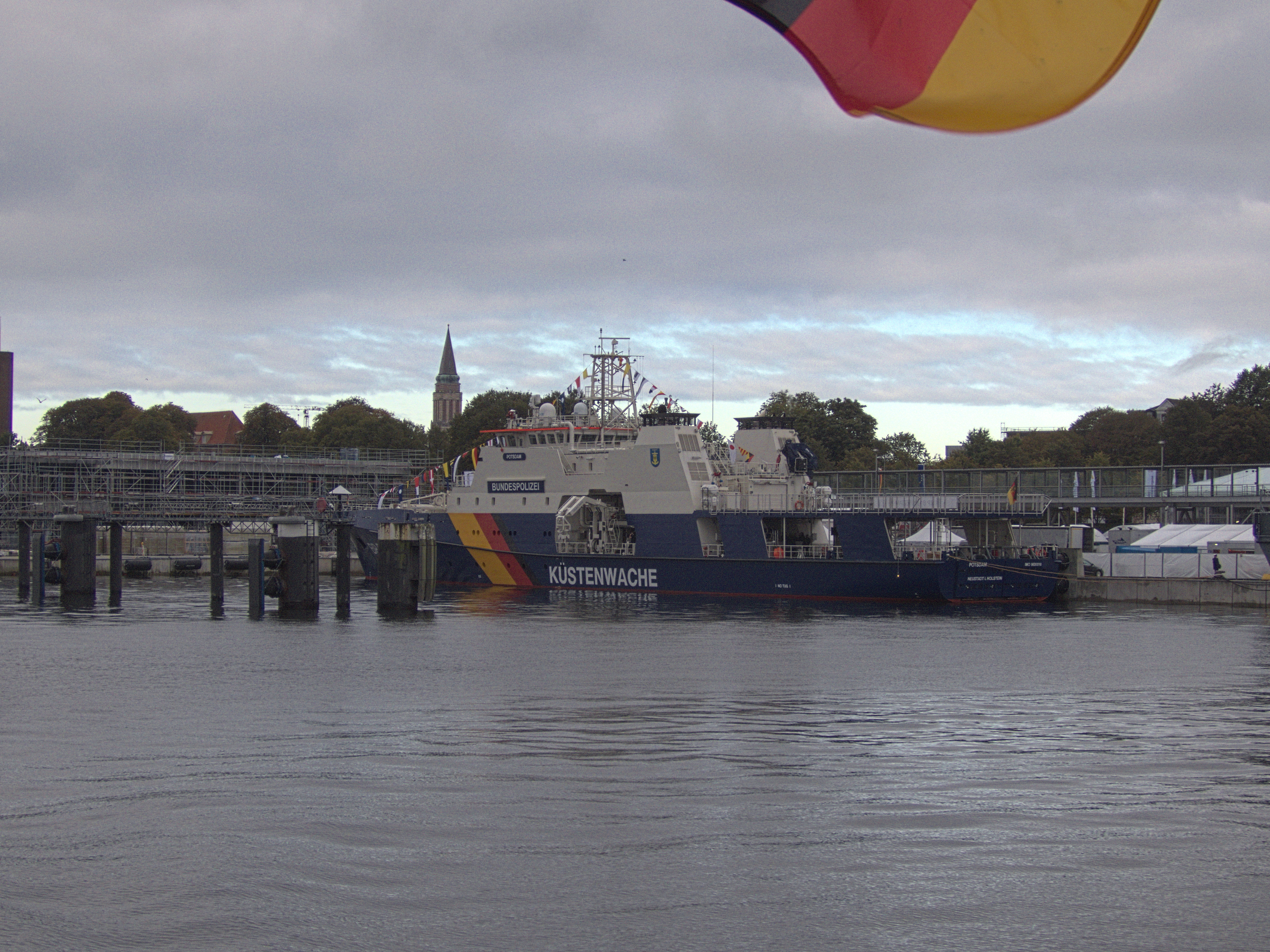 BP81 Potsdam der Bundespolizei auf dem Tag der deutschen Einheit in Kiel 2019.